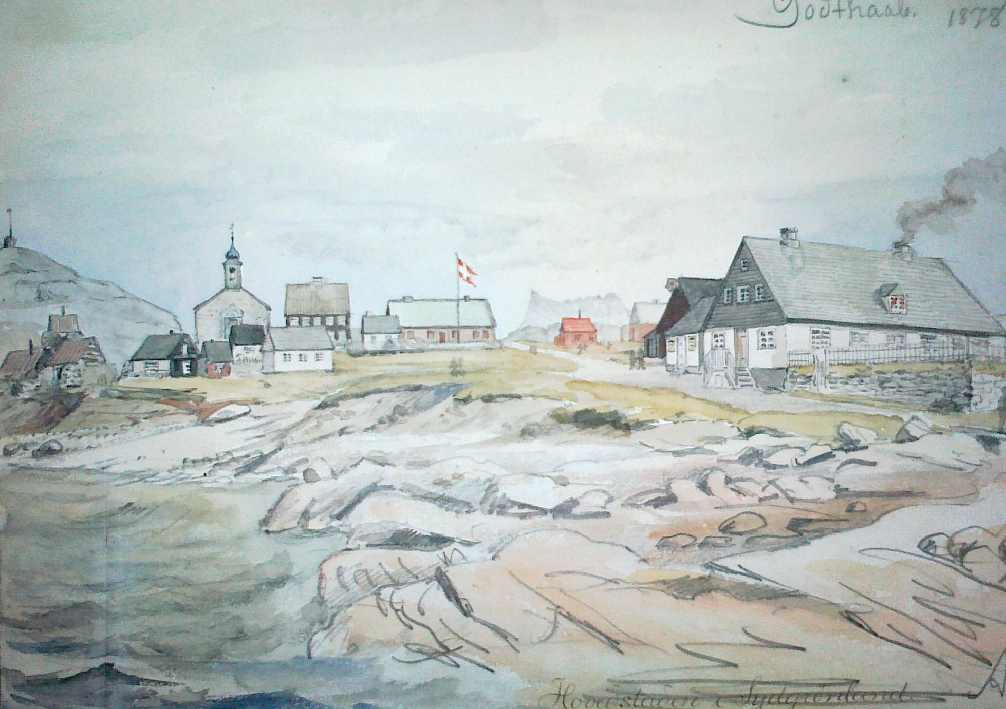 "Godthaab. Hovedstaden i Sydgrønland". Tegning af Andreas Kornerup, 25. august 1878.